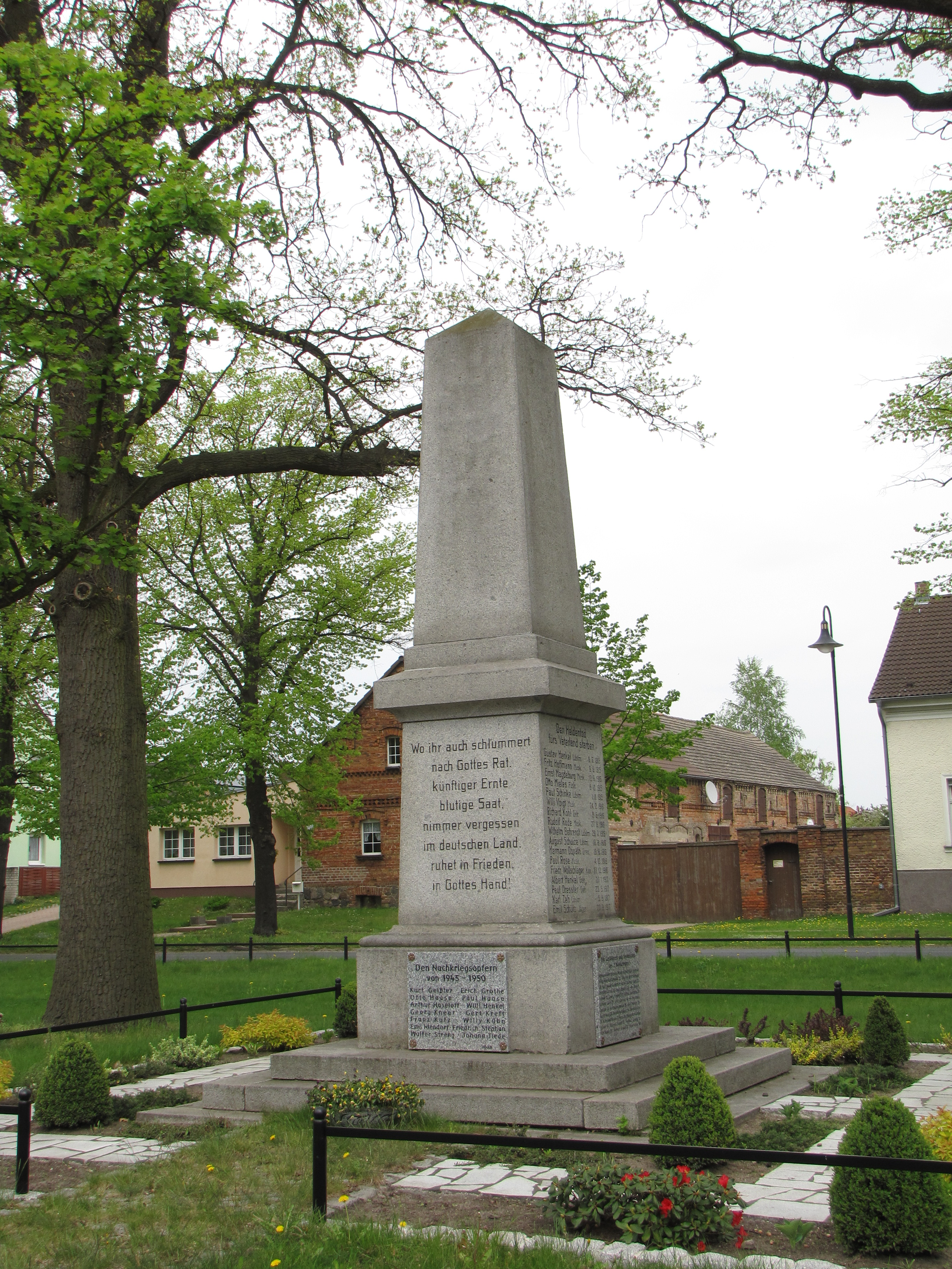 Glienick, Stadt Zossen, Brandenburg, Deutschland, Kriegerdenkmal auf der Dorfaue